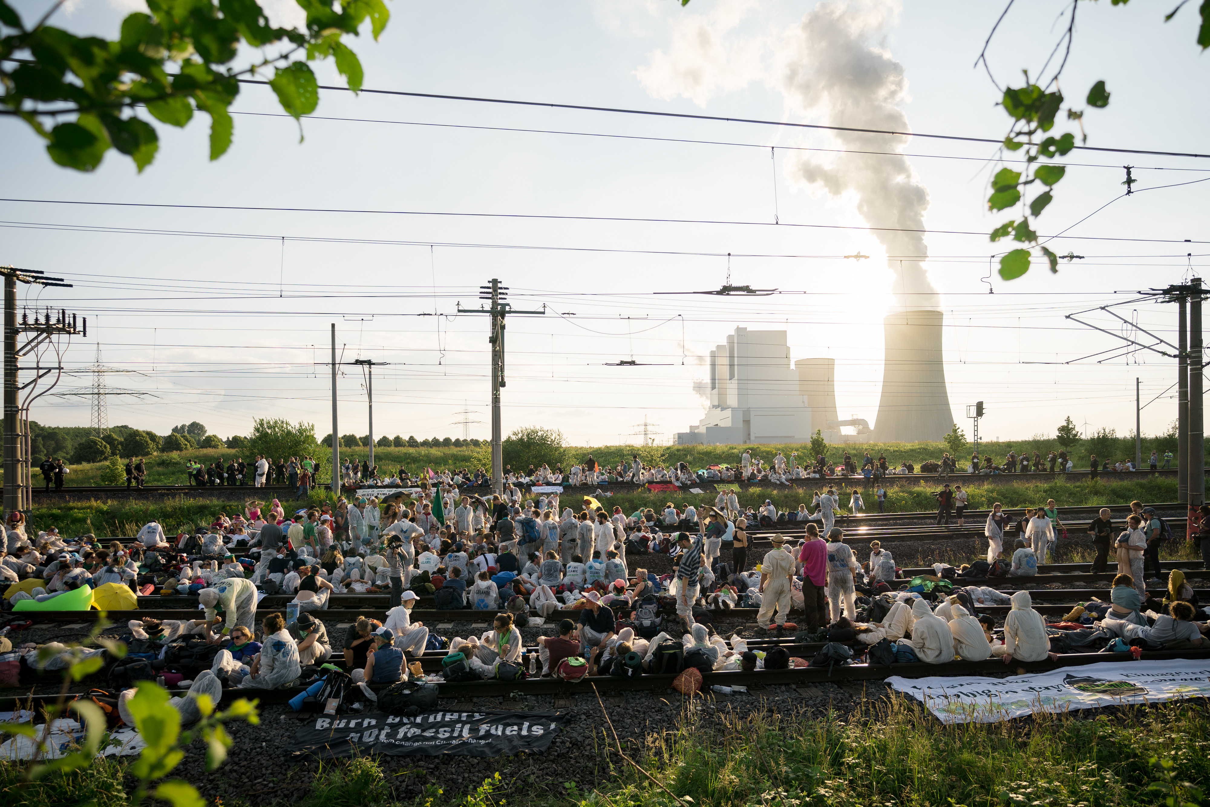 Ende Gelände 2019: Rund tausend Menschen blockierten vom 21. bis 23. Juni 2019 die für die Versorgung des Kraftwerks Neurath (Hintergrund) benötigte Nord-Süd-Bahn.